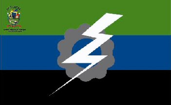 Bandera del municipio Jesús María Semprún, estado Zulia, Venezuela